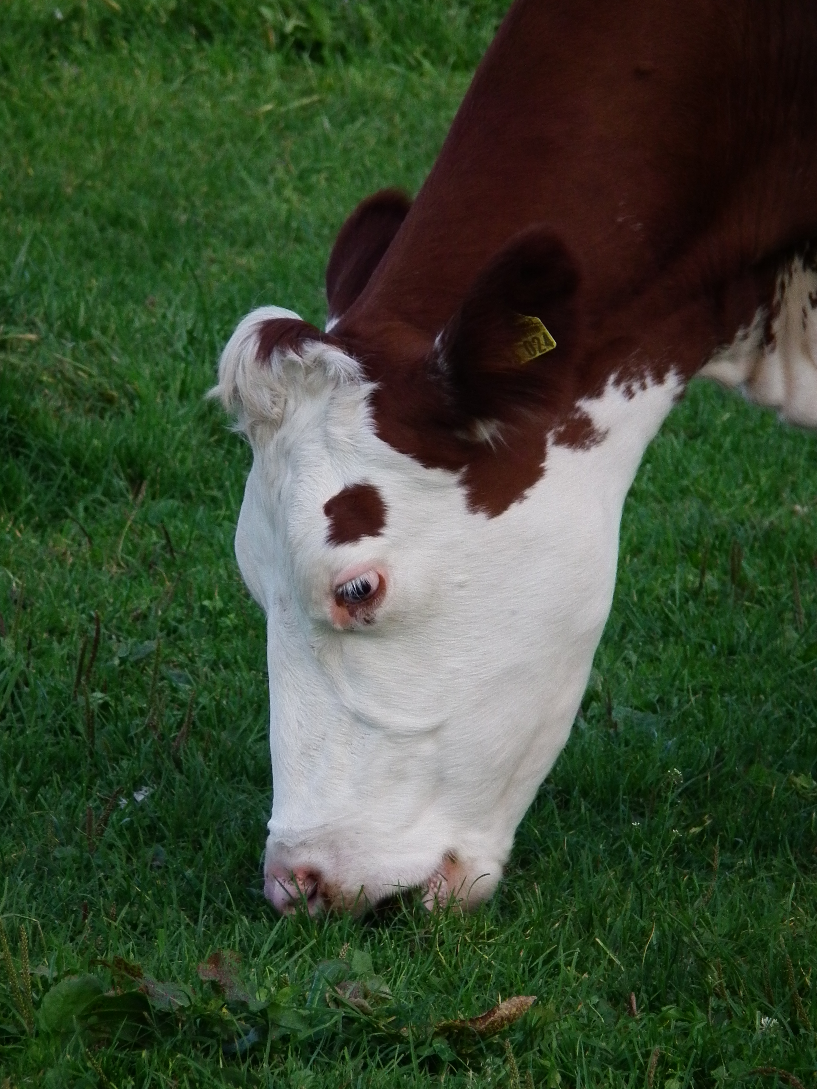 Kopf einer weidenden Milchkuh